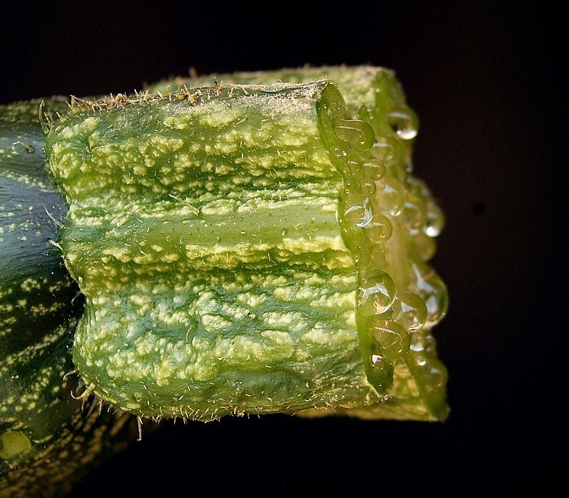 Cucurbita pepo